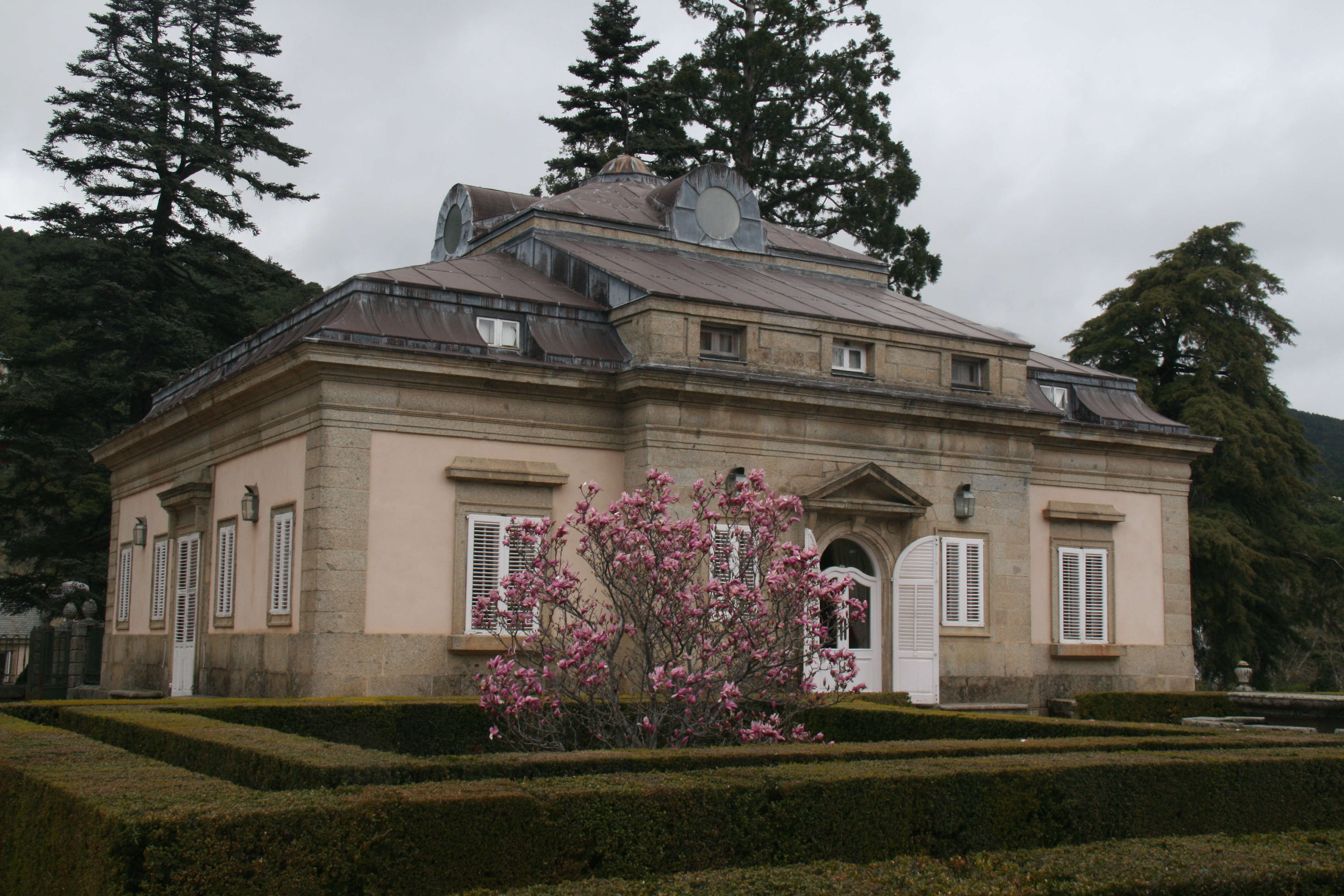 Casa del Infante Don Gabriel - San Lorenzo del Escorial